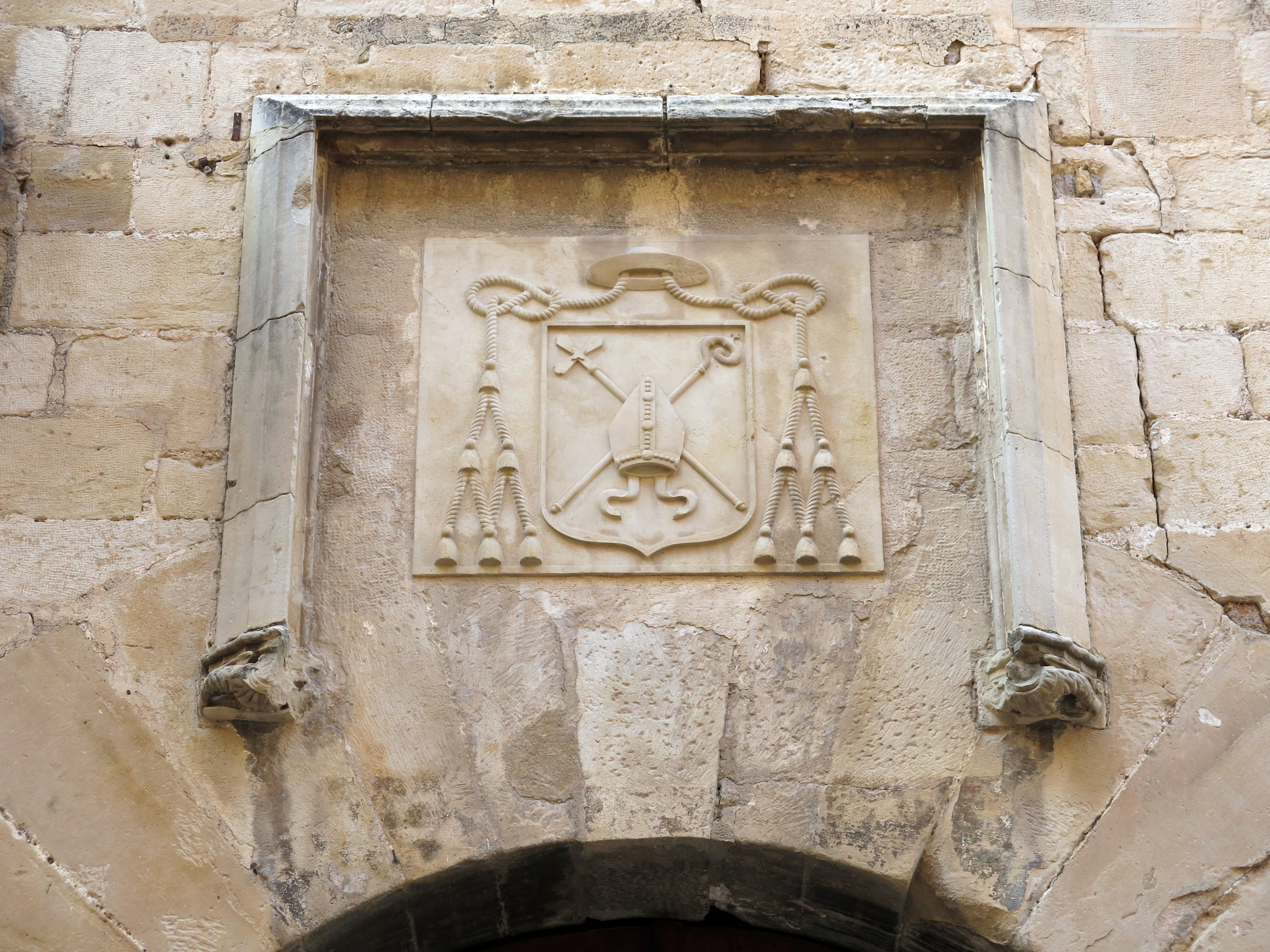 Palau Episcopal (Tortosa)